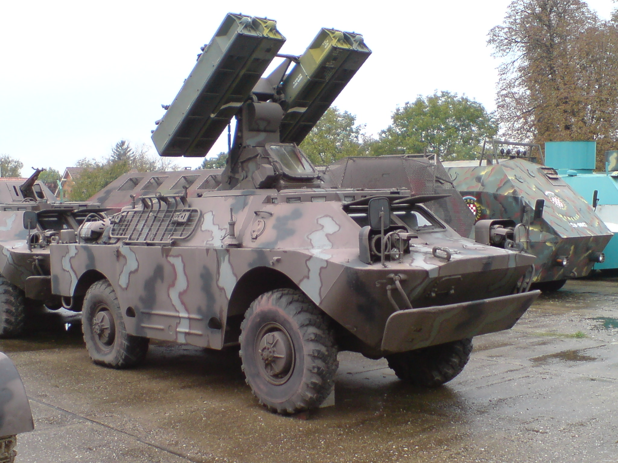 SA-9 Gaskin u vukovarskoj vojarni